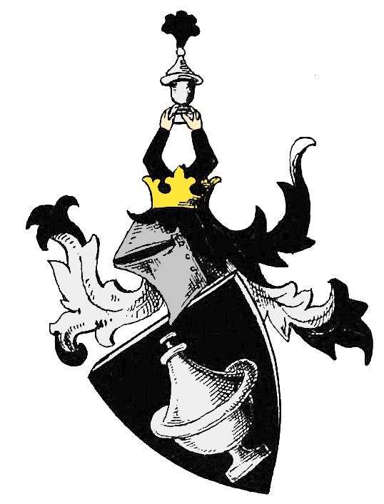 Wappen der Besserer von Thalfingen - "nach einem Denkmal aus dem Anfang des XV. Jahrhunderts, am Münster in Ulm"